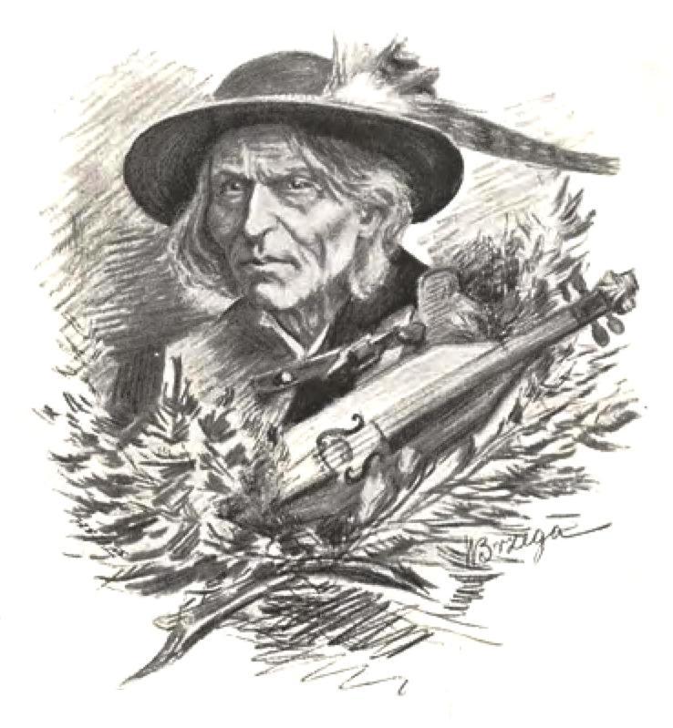 Sabała, rysunek z książki File:Andrzej Stopka Nazimek - Sabała.djvu